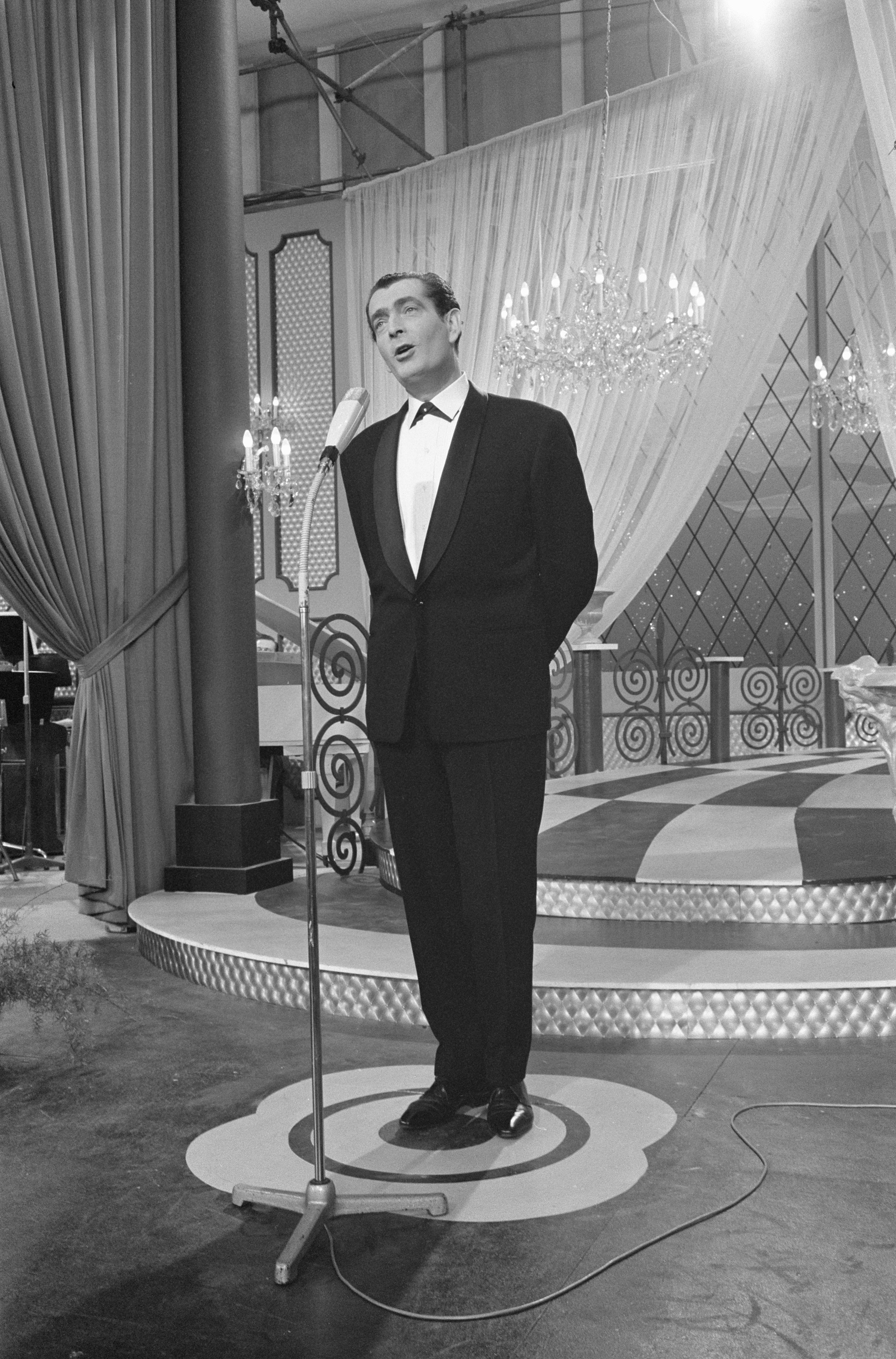 Collectie / Archief : Fotocollectie Anefo Reportage / Serie : [ onbekend ] Beschrijving : Eurovisie Songfestival 1962 te Luxemburg, voor Luxemburg Camillo Felgen Datum : 18 maart 1962 Locatie : Luxemburg Trefwoorden : artiesten, songfestivals Persoonsnaam : Felgen Camillo Fotograaf : Pot, Harry / Anefo Auteursrechthebbende : Nationaal Archief Materiaalsoort : Negatief (zwart/wit) Nummer archiefinventaris : bekijk toegang 2.24.01.05 Bestanddeelnummer : 913-6610